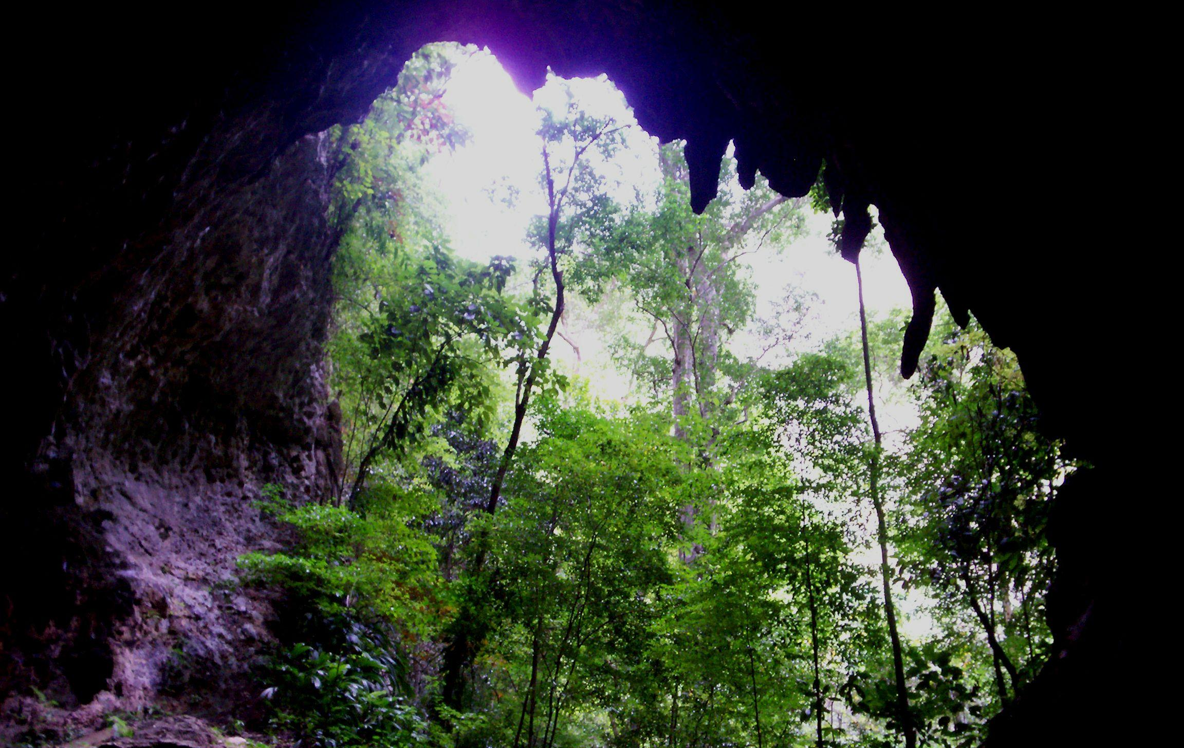 Foto de la cueva de la quebrada del toro.